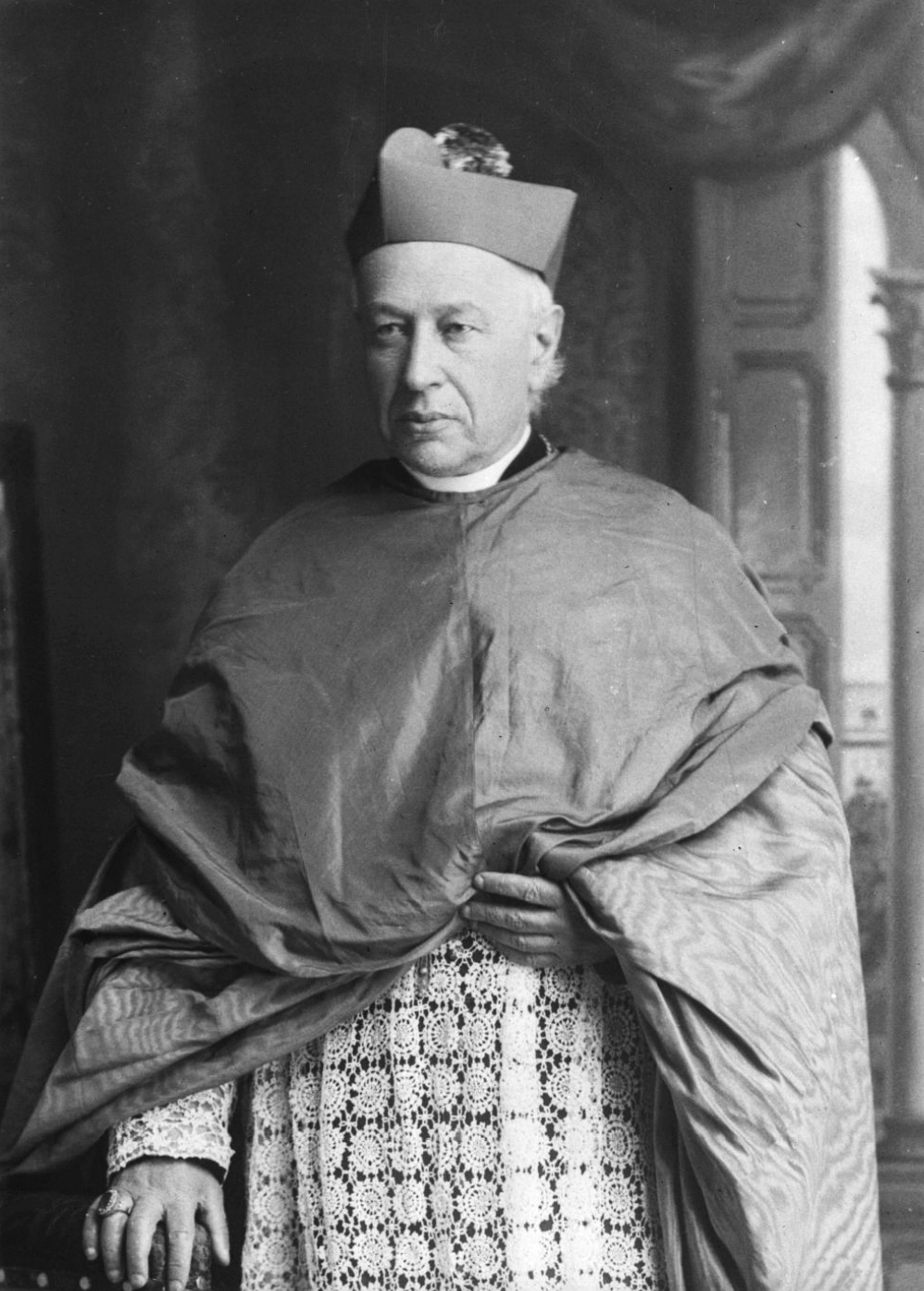 Monseigneur Elzéar-Alexandre Taschereau . - 1886